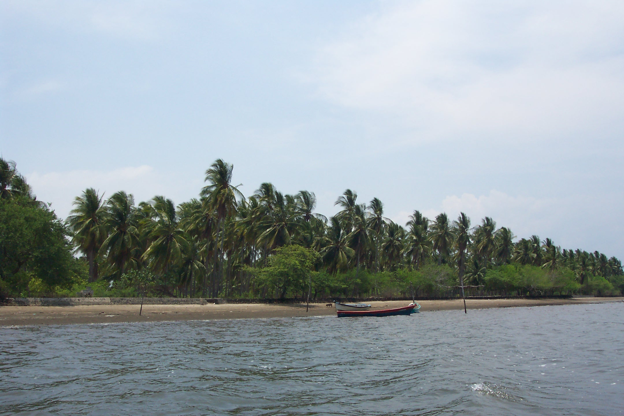 Isla Madre Sal, Bahía de Jiquilisco, El Salvador